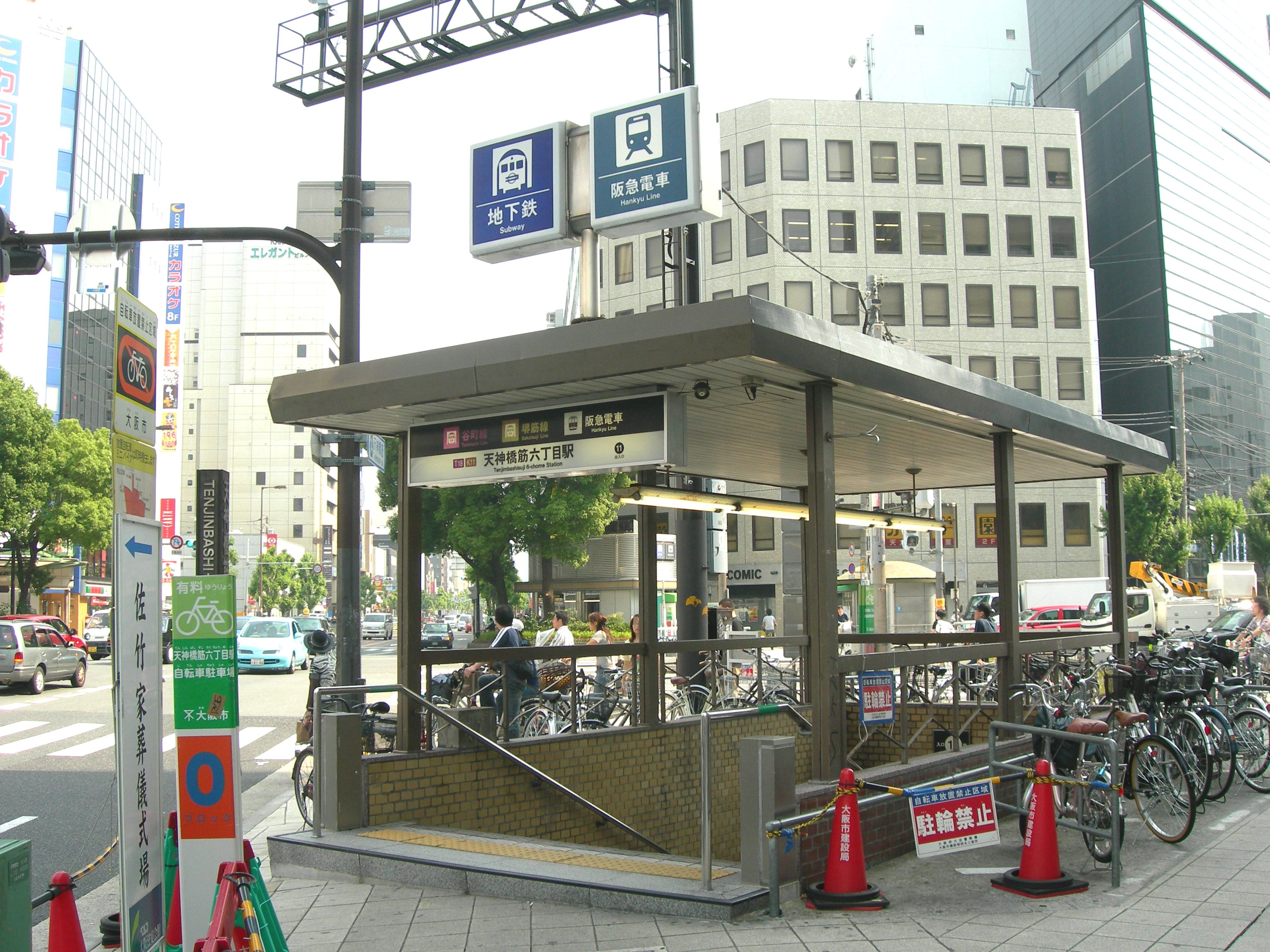 Tenjimbashisuji 6-chome Station.